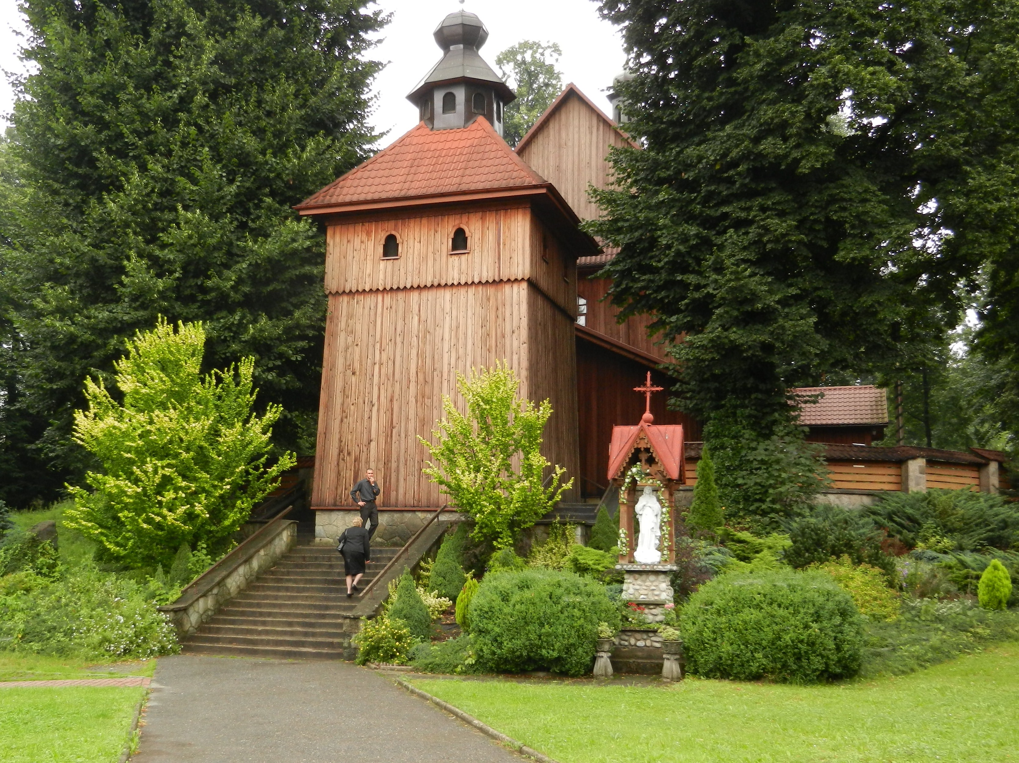 Wiśniowa - kościół św. Marcina - Dzwonnica